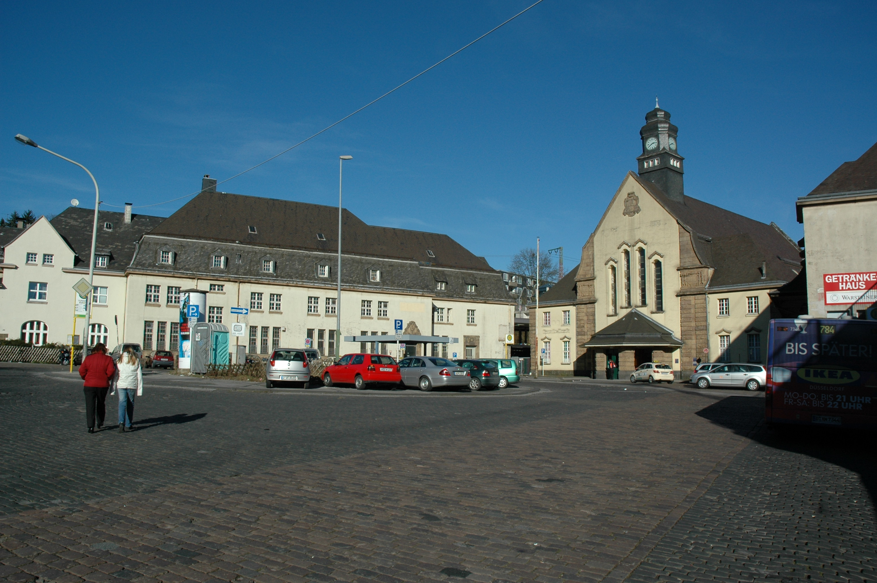 Wuppertal-Vohwinkel, Bahnhofsvorplatz mit Bahnhof und altem Postgebäude